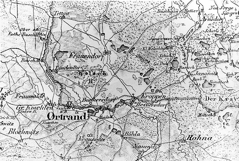 Original image description from the Deutsche Fotothek Ortrand-Burkersdorf. Oberlausitzkarte, Schenk, 1759